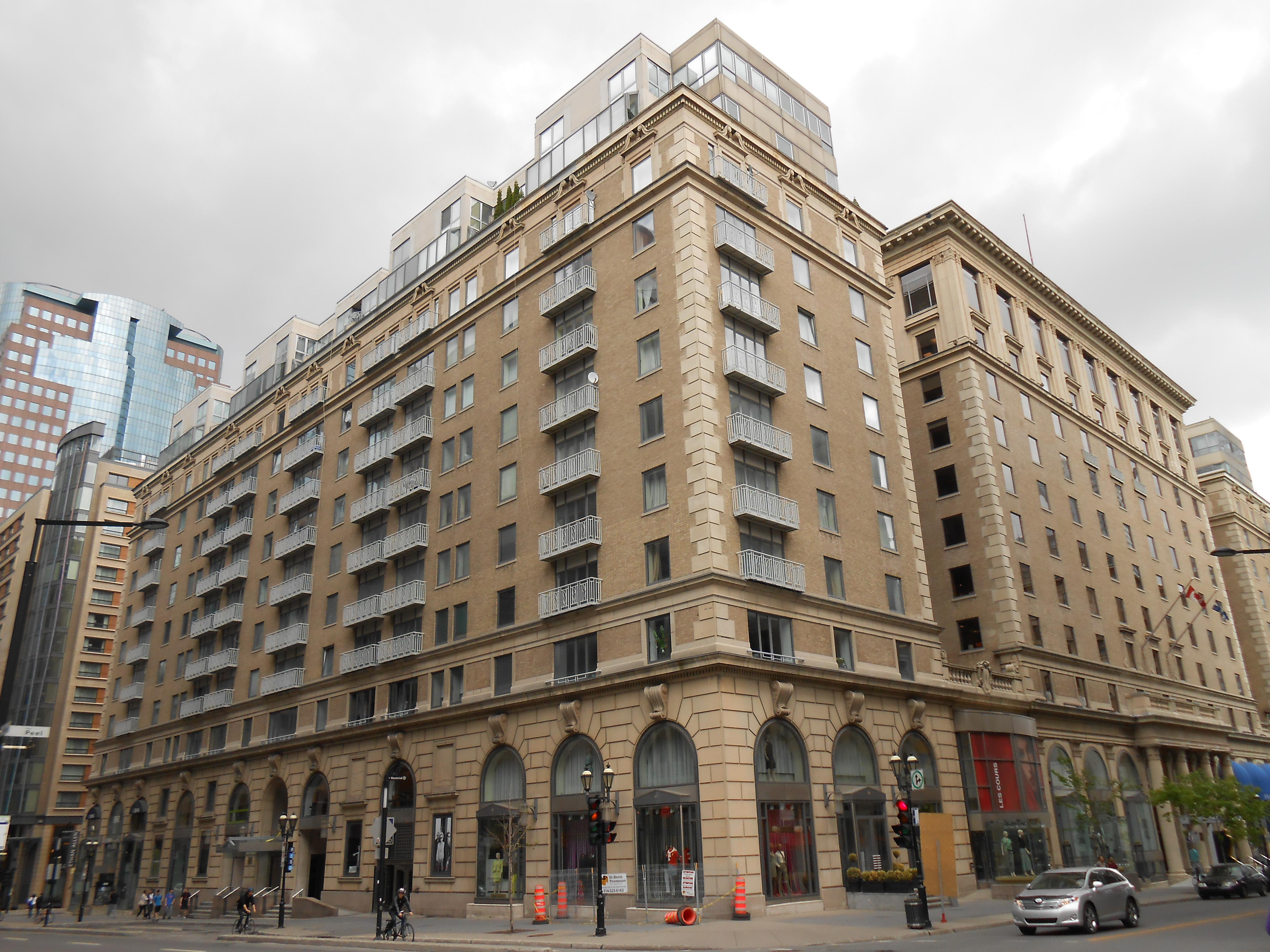 Cours Mont-Royal, 1455, rue Peel, Montréal